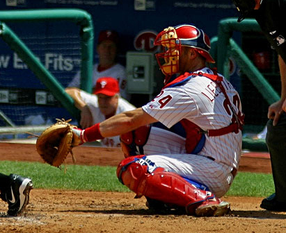 Mike Lieberthal